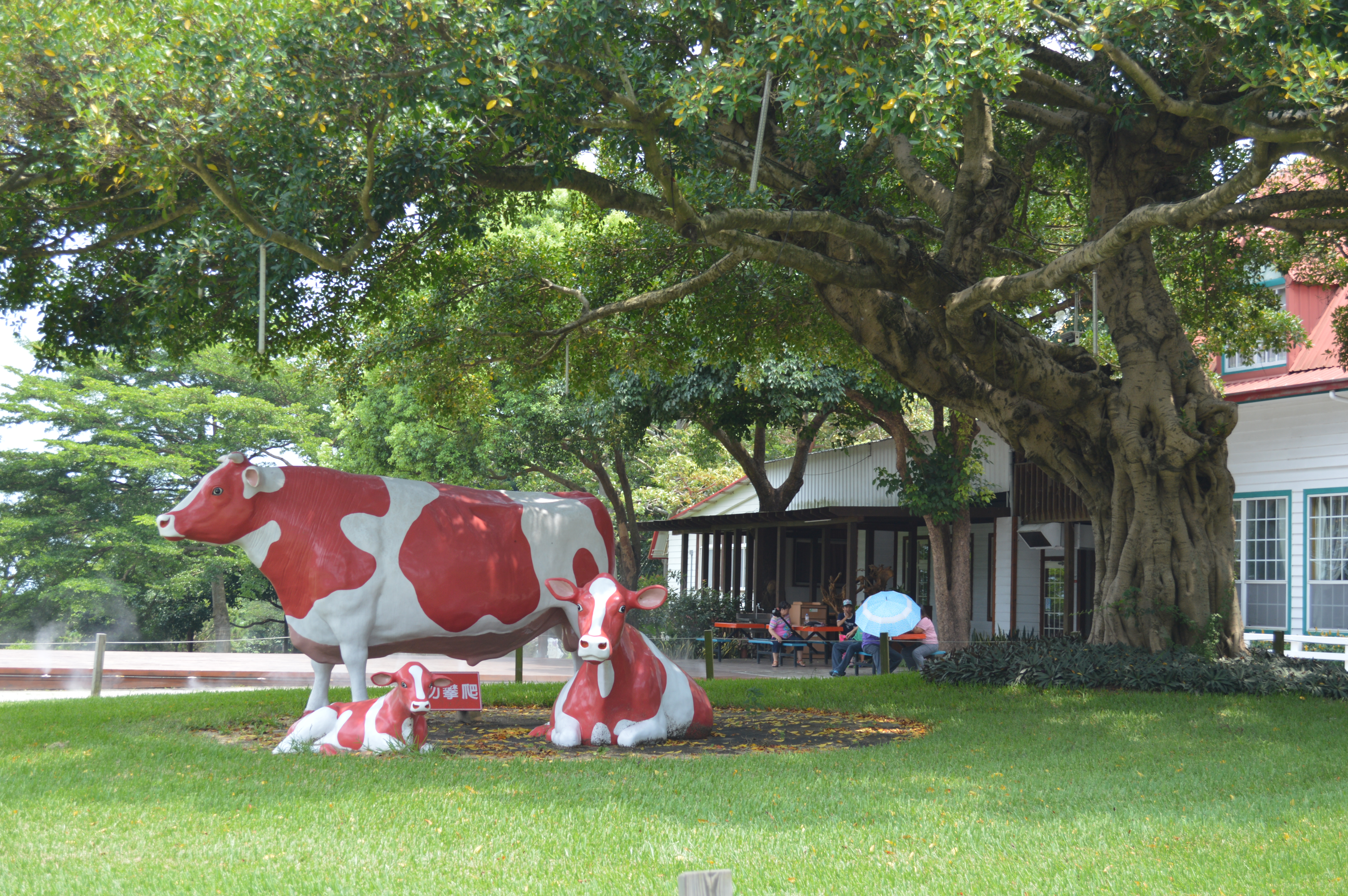 飛牛牧場內的乳牛雕像